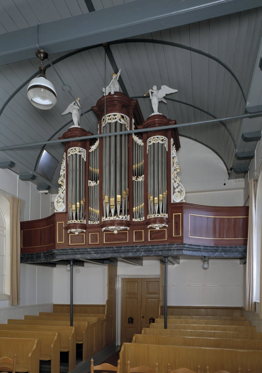 Nederlands Hervormde Kerk: Interieur, aanzicht orgel, orgelnummer 421 (opmerking: Gefotografeerd voor Het Historische Orgel in Nederland 1858-1865)